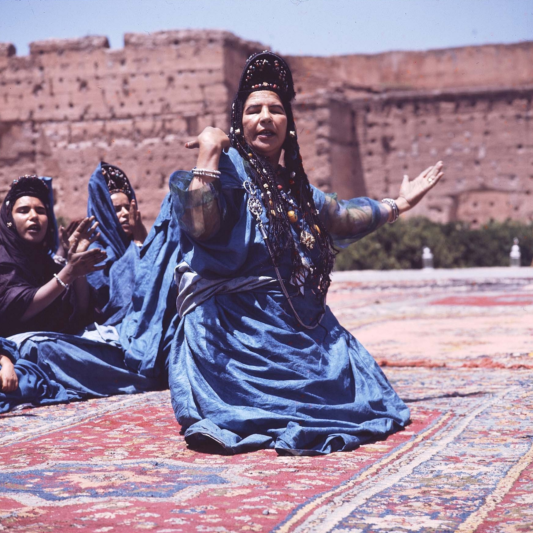 De vrouwendansgroep op de foto voert een guedra-dans uit. De vrouwen behoren tot de Reguibat, een bevolkingsgroep uit de huidige westelijke Sahara die zich als Arabisch identificeert. Ze spreken het Arabische dialect Hassania, een mengeling van Berbers en bedoeïenen Arabisch. Deze bevolkingsgroep stamt deels af van de Mâaquil, een oorspronkelijk uit Jemen afkomstige bevolkingsgroep die in de 11/12e eeuw vanuit het Arabisch schiereiland naar Noord-Afrika is geëmigreerd. Daarnaast stammen de Reguibat af van gearabiseerde Berberstammen (Sanhaja). In de cultuur van de Reguibat zijn vele Berberinvloeden te vinden, zoals de dans- en zangstijlen die verwant zijn aan die van de Touaregs in de Sahara.